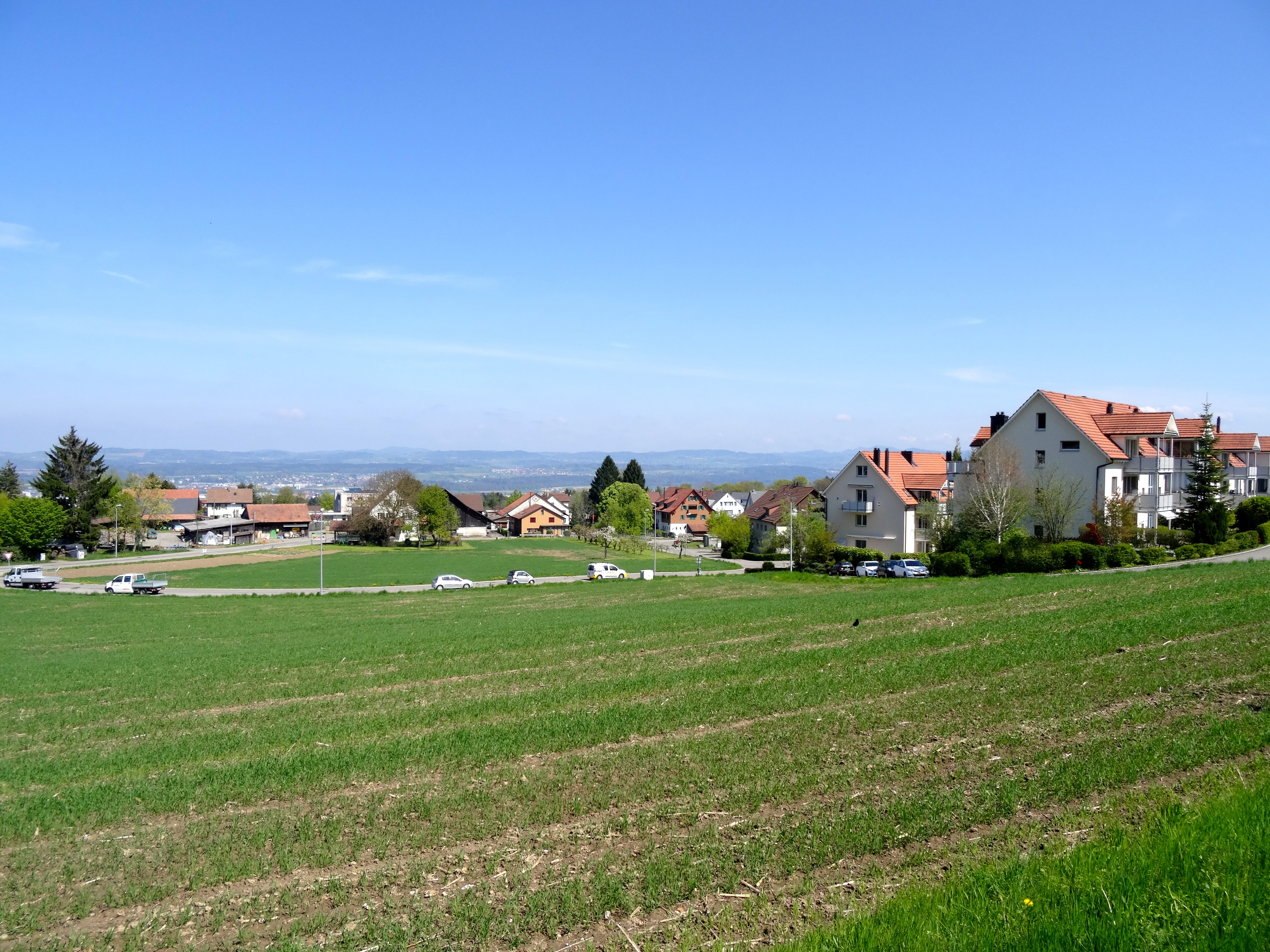 Maur Binz